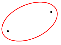 Ellips+focus